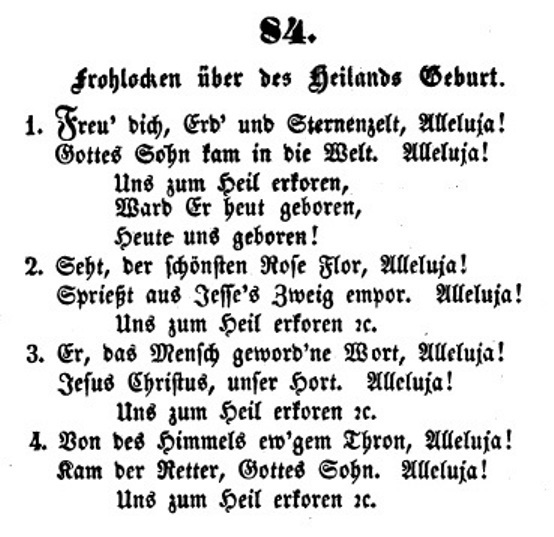 Erstdruck des Liedes Freu dich, Erd und Sternenzelt nach dem tschechischen Narodil se Kristus pán